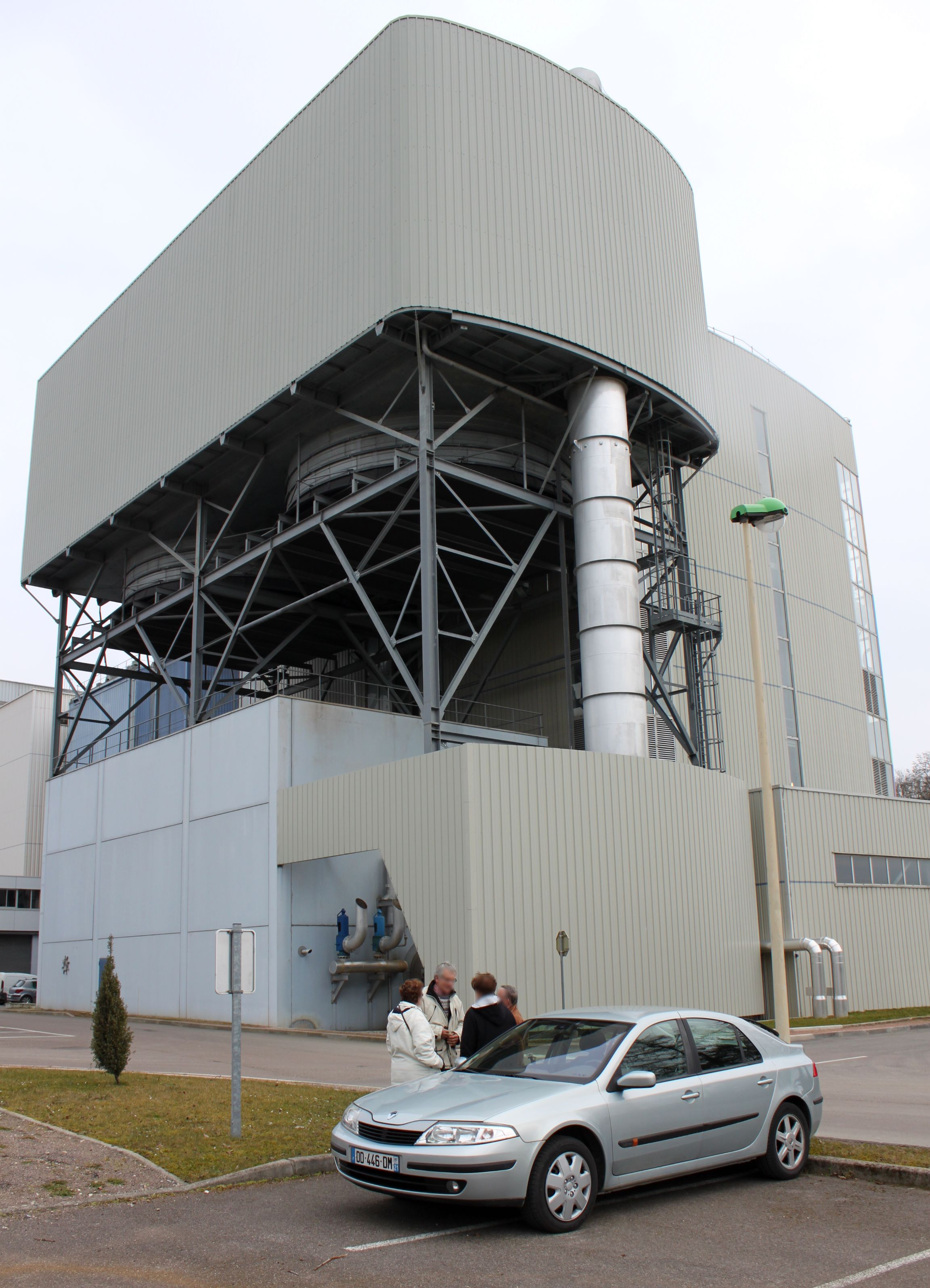 Usine d'Incinération d'ordures ménagères du grand Dijon, Dijon, Côte-d'Or, Bourgogne, France